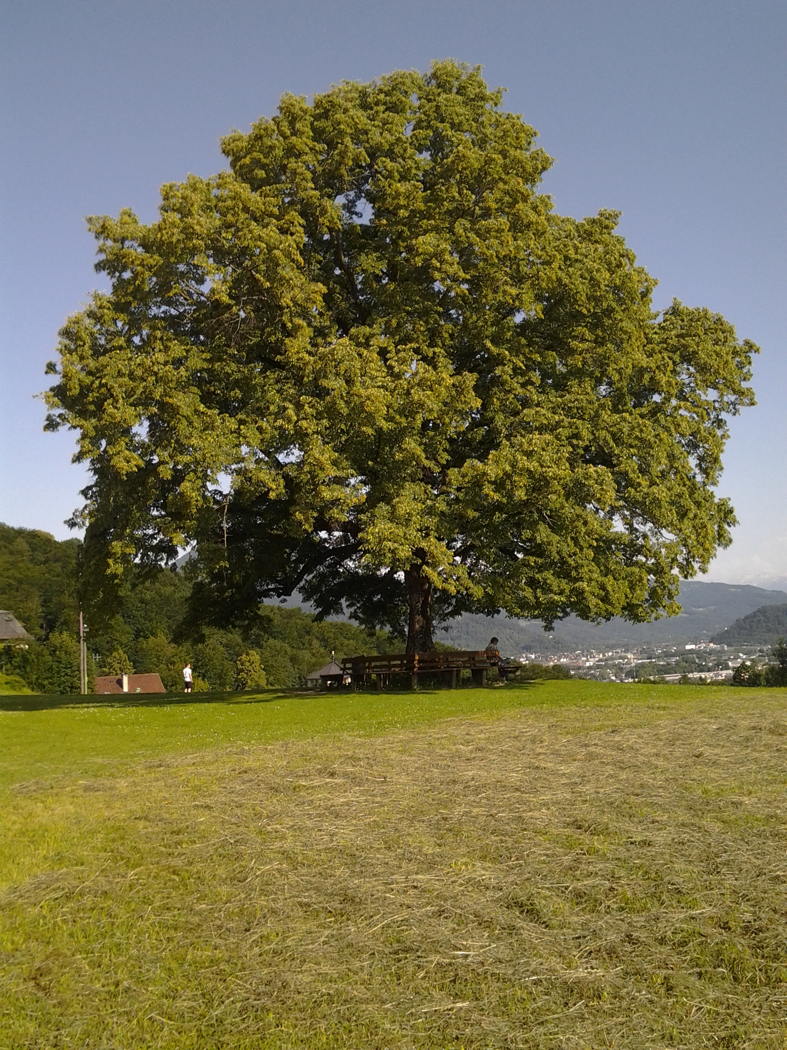 Naturdenkmal "Linde bei der Plainkirche" am Plainberg, Gemeinde Bergheim, Land Salzburg This media shows the natural monument in Salzburg with the ID NDM00209.